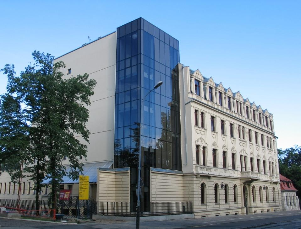 Centrum Konferencyjne Instytutu Europejskiego w Łodzi